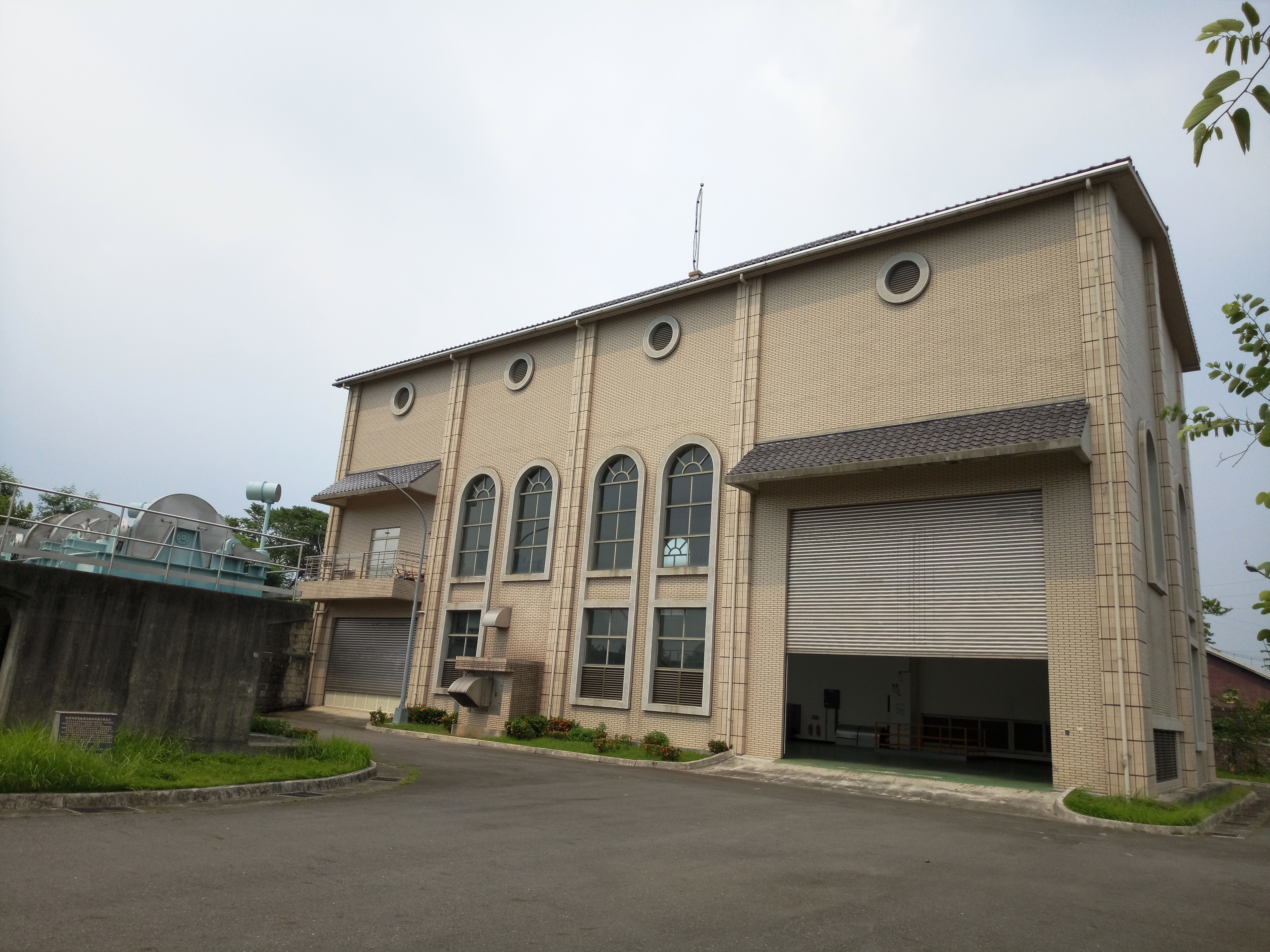 明潭發電廠濁水機組新廠房外觀